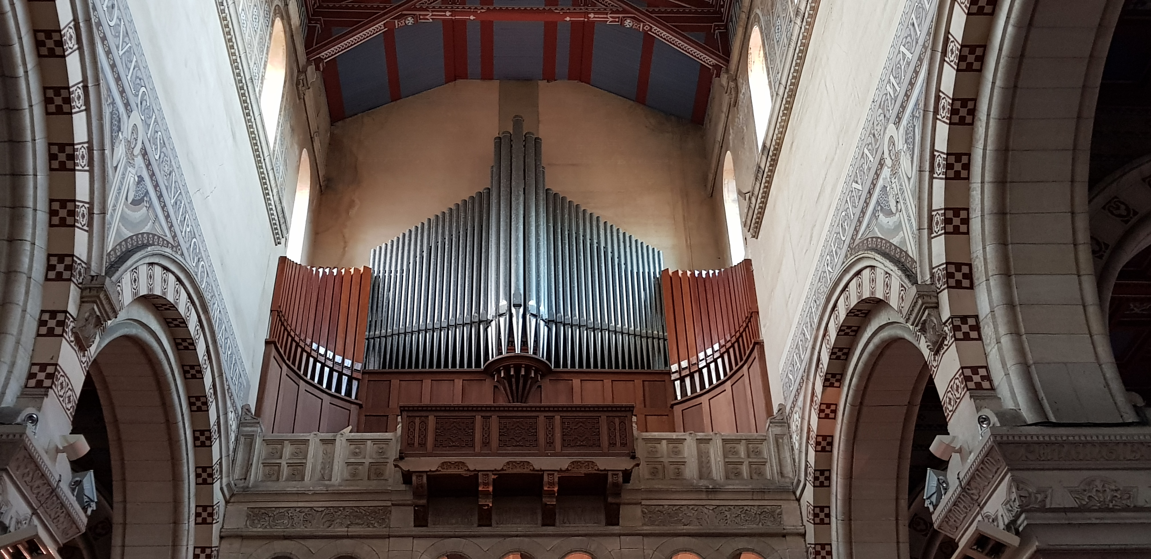 Orgue de tribune de la basilique Notre-Dame de Brébières d'Albert (Somme - France)